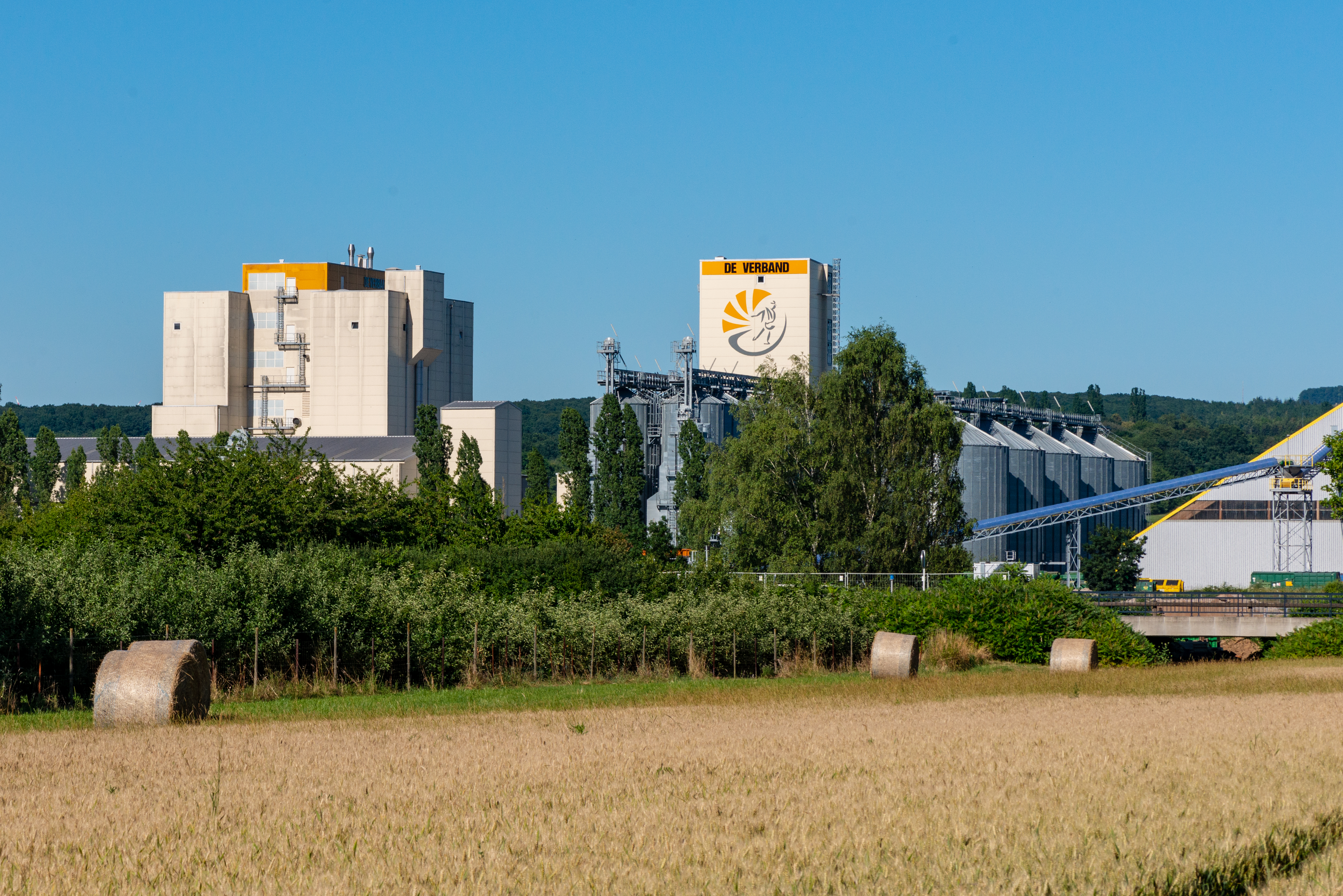 "De Verband" déisäit der Musel zu Perl.